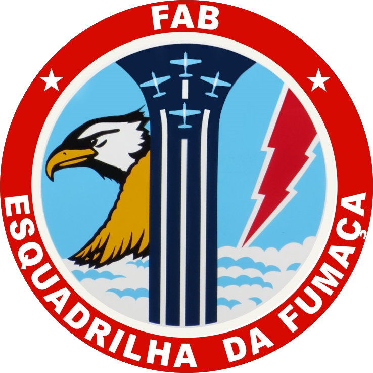 Logo Esquadrão de Demonstração Aérea